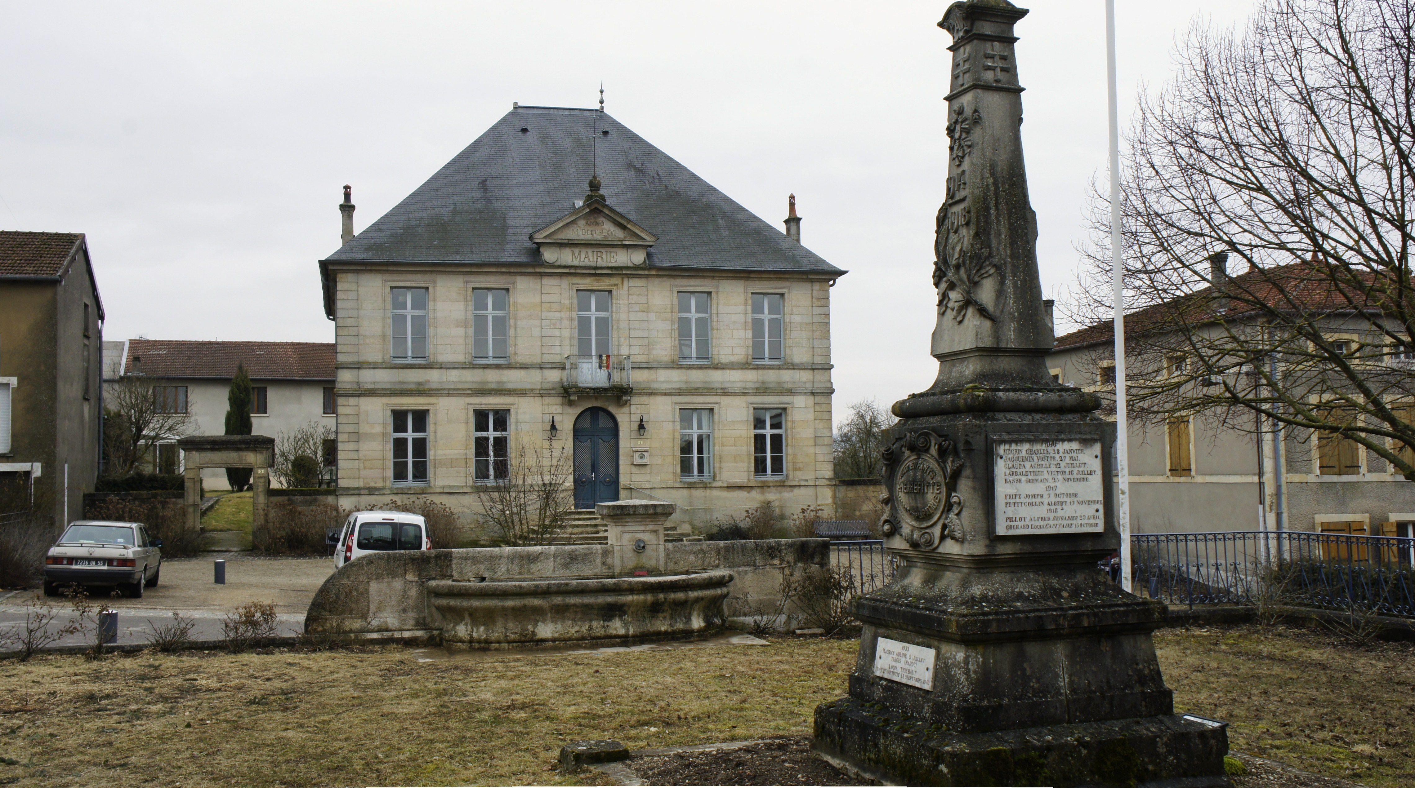 La Mairie de Pierrefitte-sur-Aire (Meuse, France).